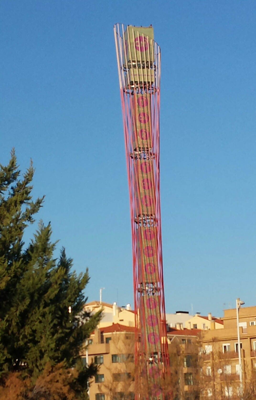 Vista del Pirulí de CMT en Albacete